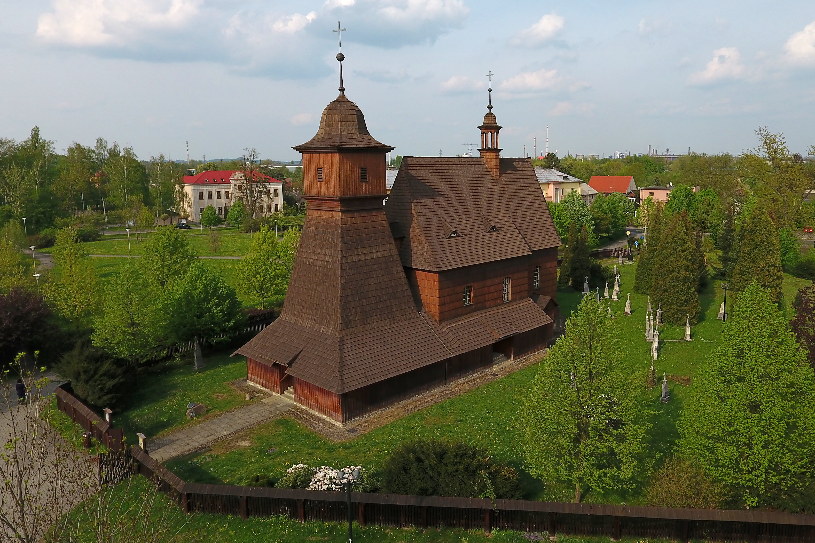 Ostrava-Hrabová, Kostel Svaté Kateřiny Alexandrijské, vlevo od něj budova úřadu